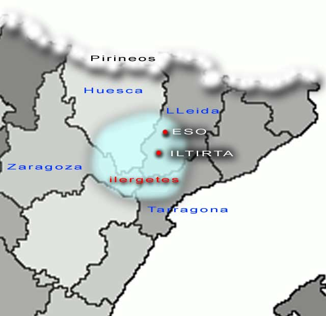 mapa situacion del pueblo Pre-romano de ilergetes transformado a partir del mapa Image:Provincia Araba.png user:papix